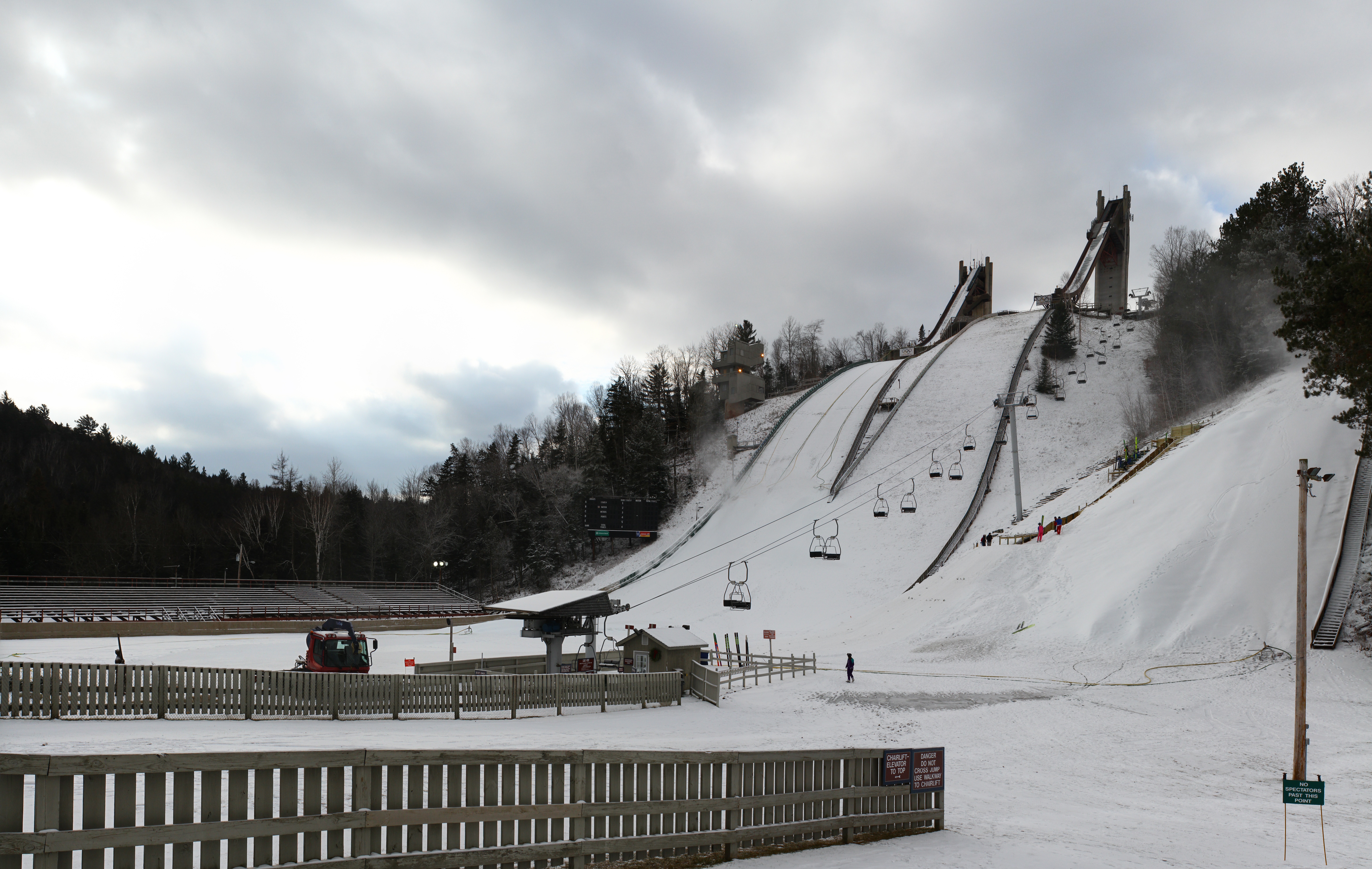 Lake Placid, NY